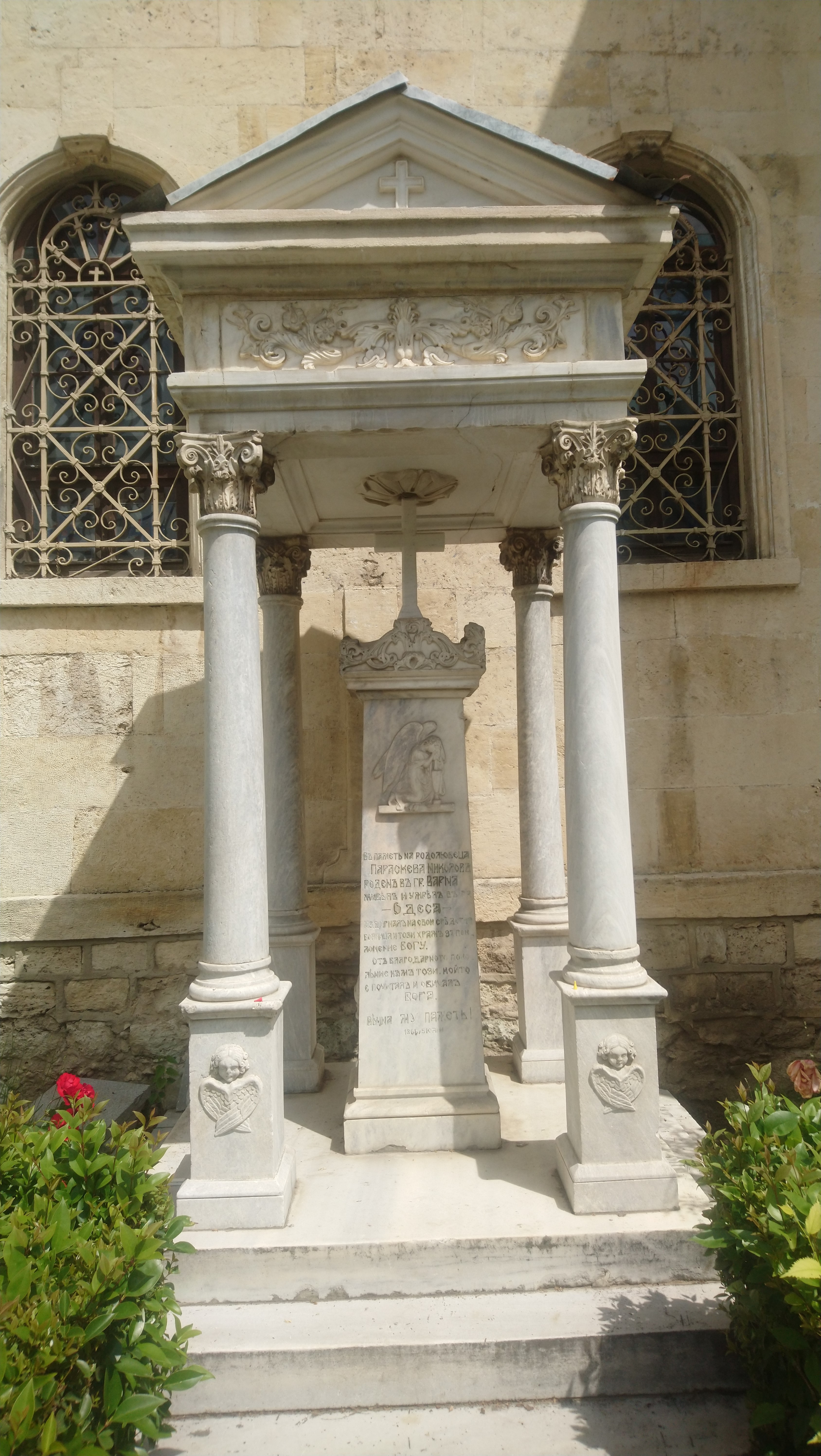 Мемориал на Параскев Николов (Параскева Николау) във Варна